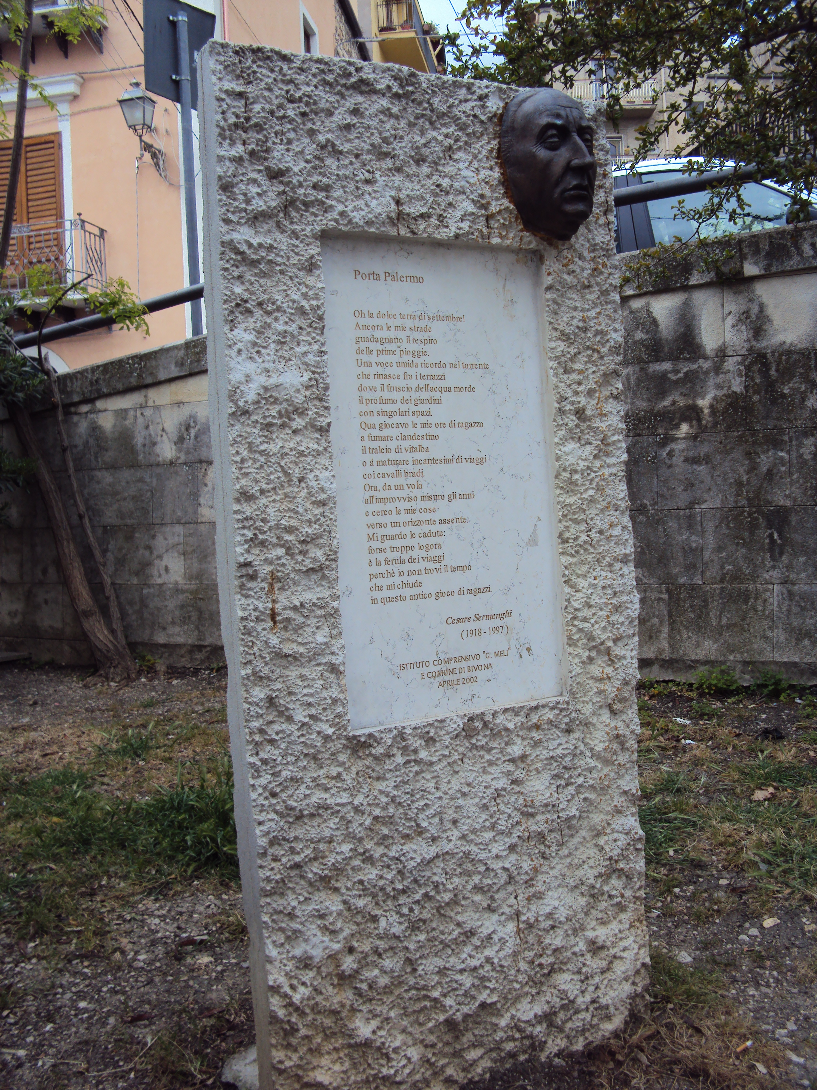 Cesare Sermenghi